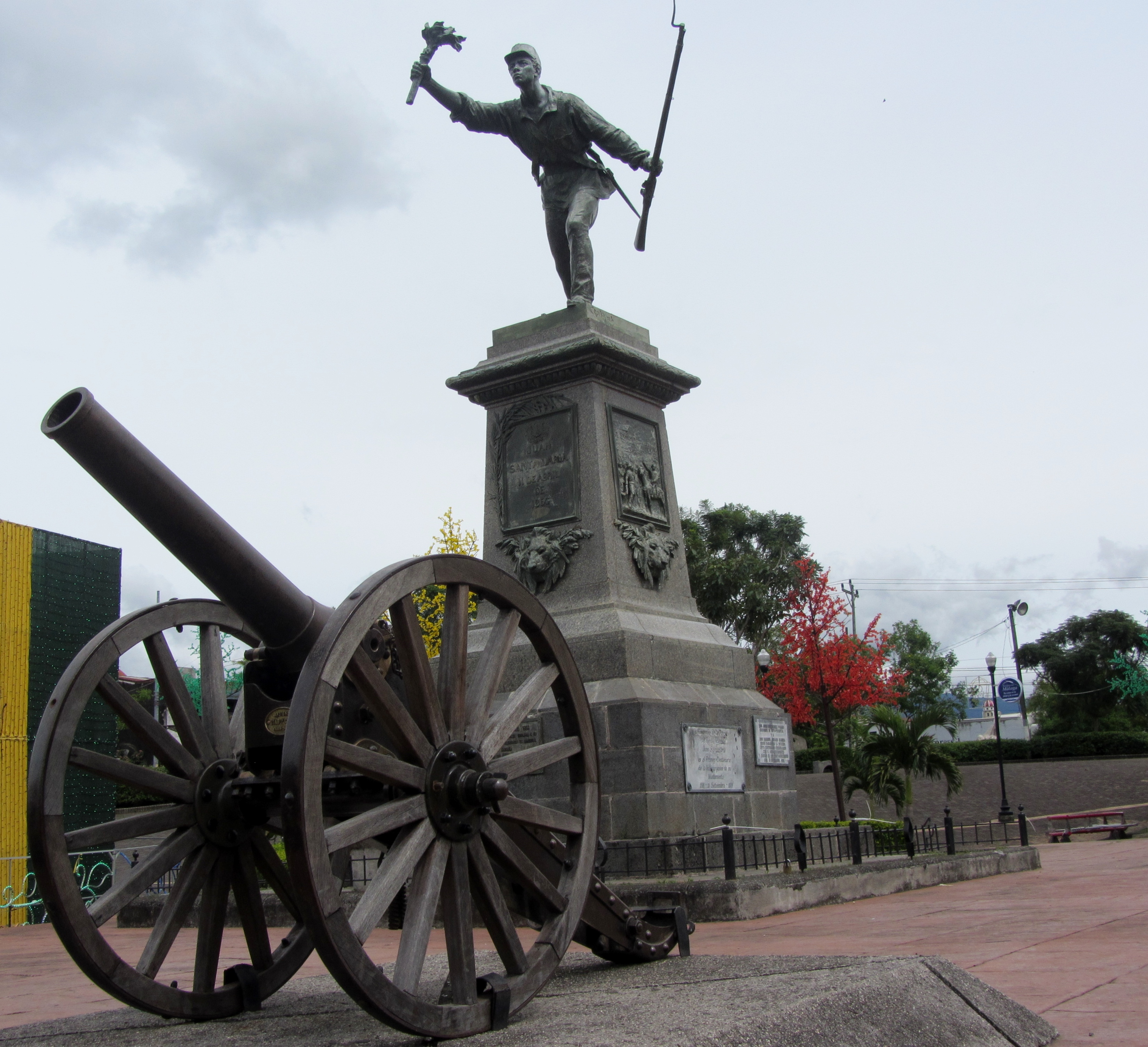 Estatua de Juan Santamaía, Alajuela, Costa Rica